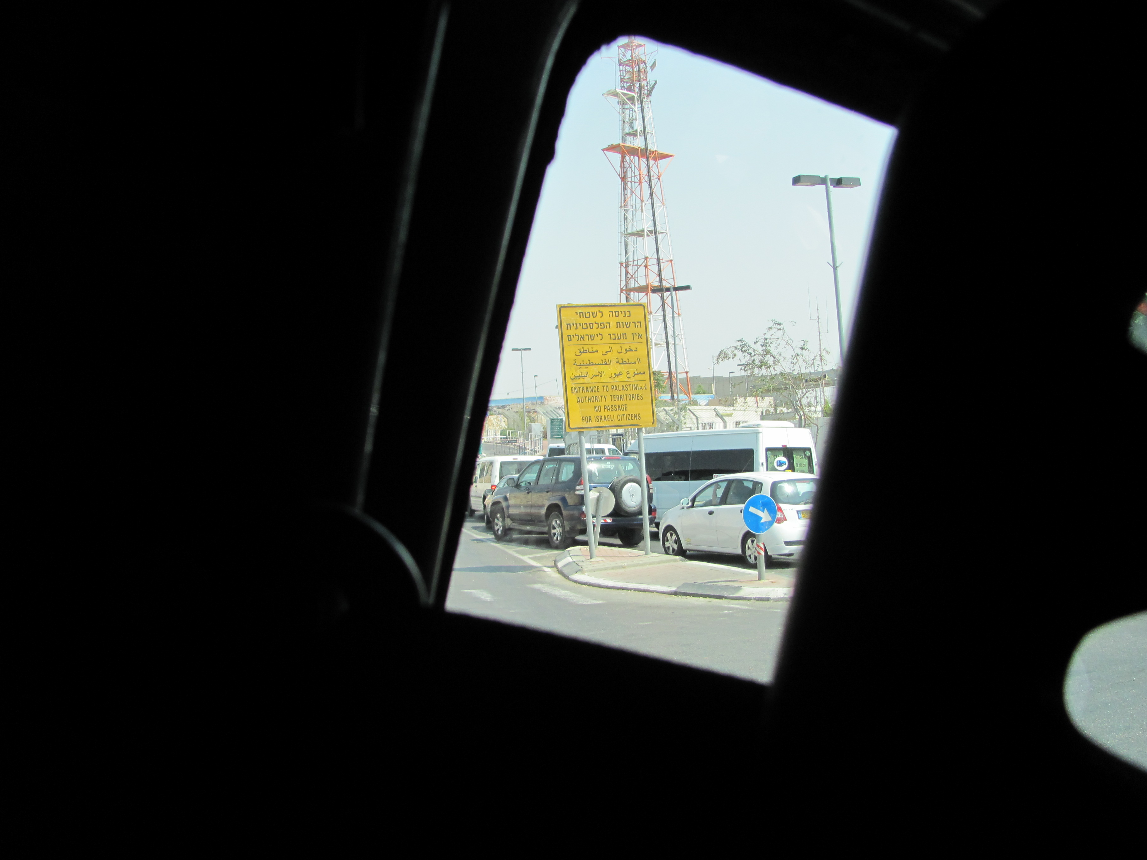 Puesto de constrol israelí en el límite entre Jerusalem y Belén.